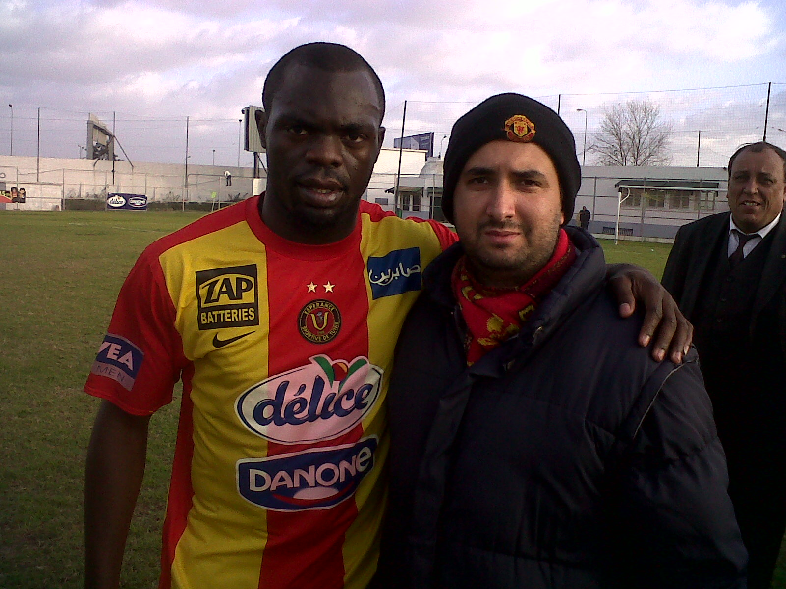 N'Djeng avec l'un de ses fans